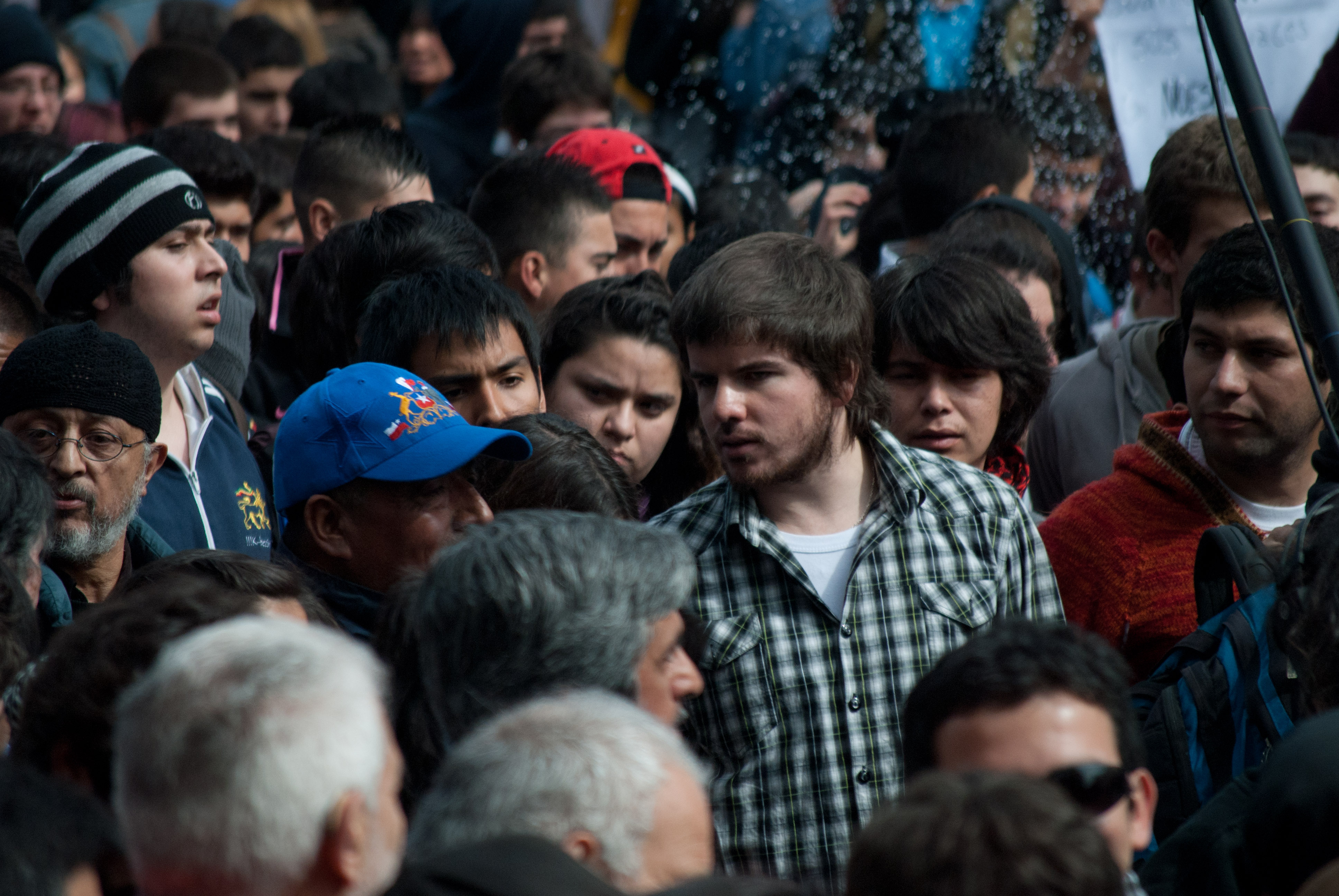 Giorgio Jackson marchando.